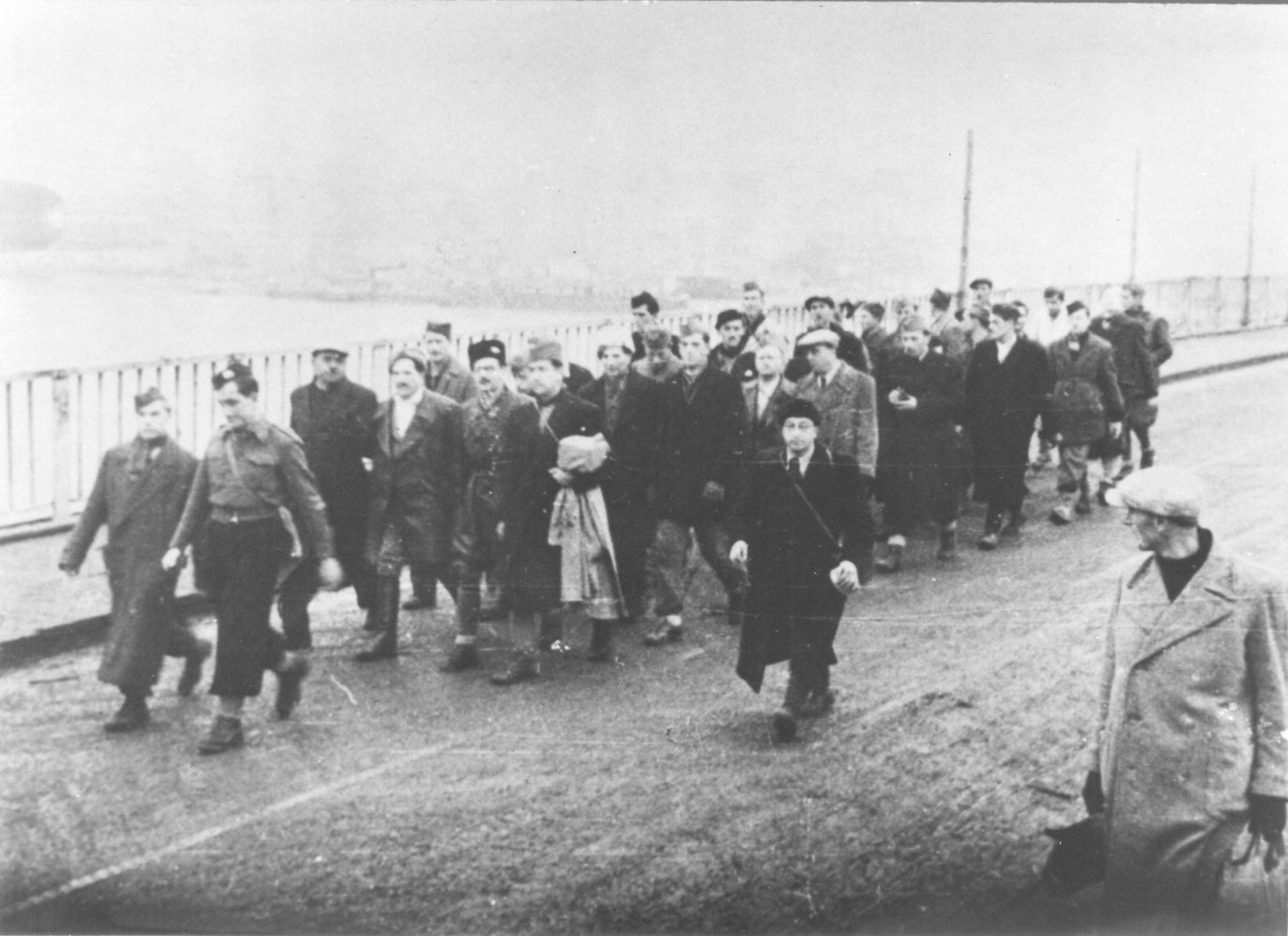 Grupa boraca 5.bataljona (slovenačkog) 1.krajiške NOU brigade u pokretu iz Beograda za sremski front,radi ulaska u sastav svoje novoformirane jedinice.Beograd, 7. decembar 1944.